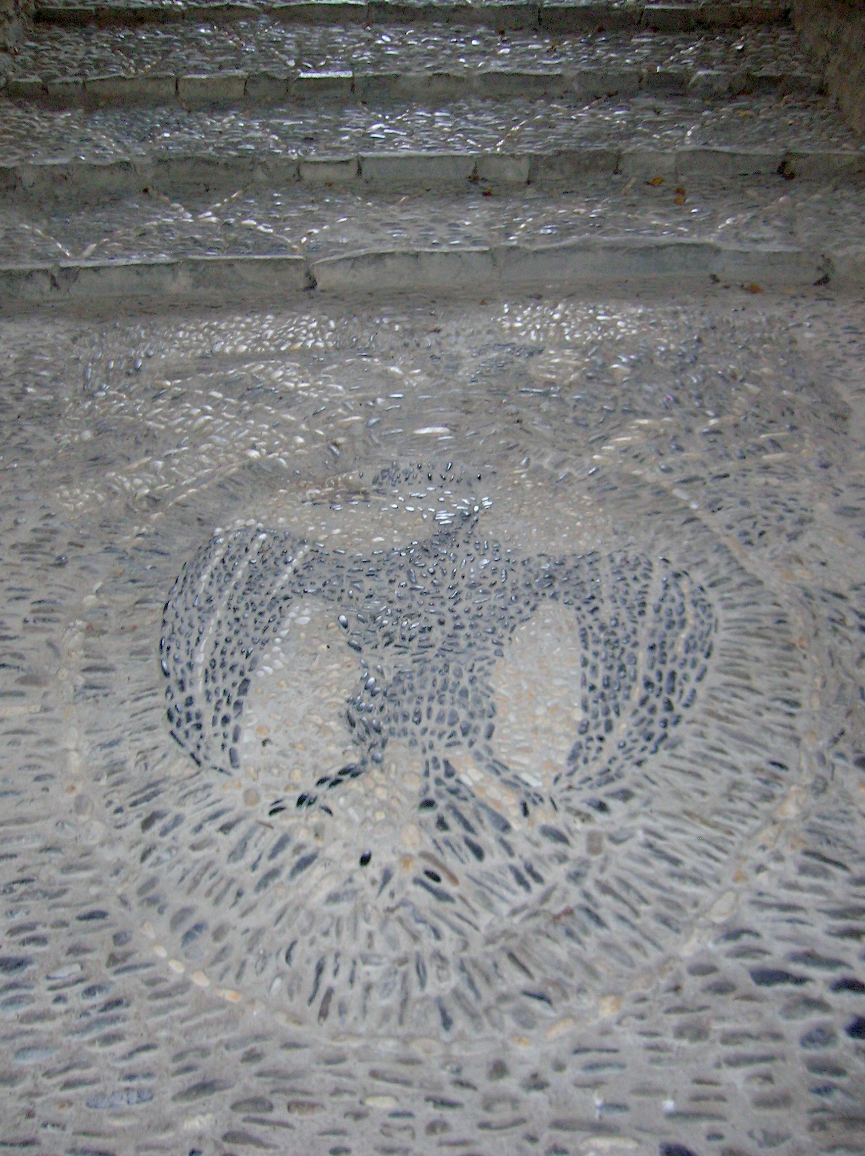 Castello di Dolceacqua, Liguria, Italia.